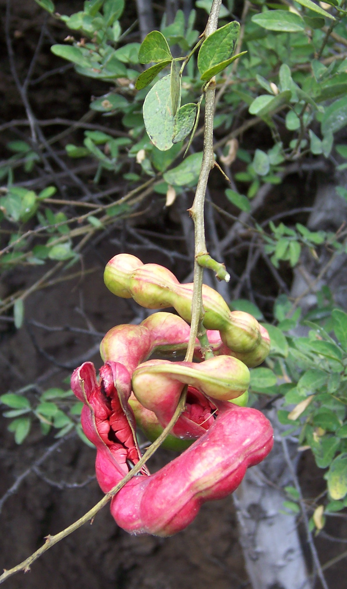 Photo : B.navez - SEP 2005 - Reunion island (Escambrón - Puerto Rican name) Pithecellobium dulce (Roxb.) Benth. fr Tamarin d'Inde - gousses entr'ouvertes montrant l'arille des graines en ajar beans